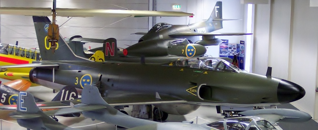 Saab J 32E Lansen, här utställd på Flygvapenmuseum i Linköping. Individen levererades till Flygvapnet som en J 32B den 29 maj 1959, och kom att tjänstgöra vid F 1 (1-41), F 21 (21-34), F 3 (3-06), F 13 (13-06), F 16 (16-06). År 2007 återfick den vid Flygvapenmuseum märkningen 3-06. I bakgrunden på bilden syns bland annat J 29B Tunnan (29398).